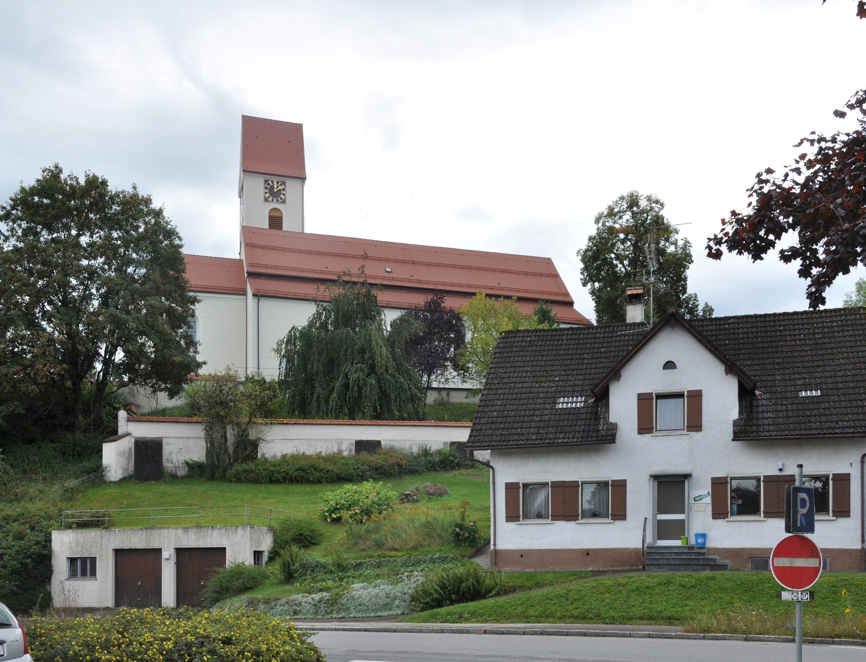 Leupolz, Stadt Wangen im Allgäu